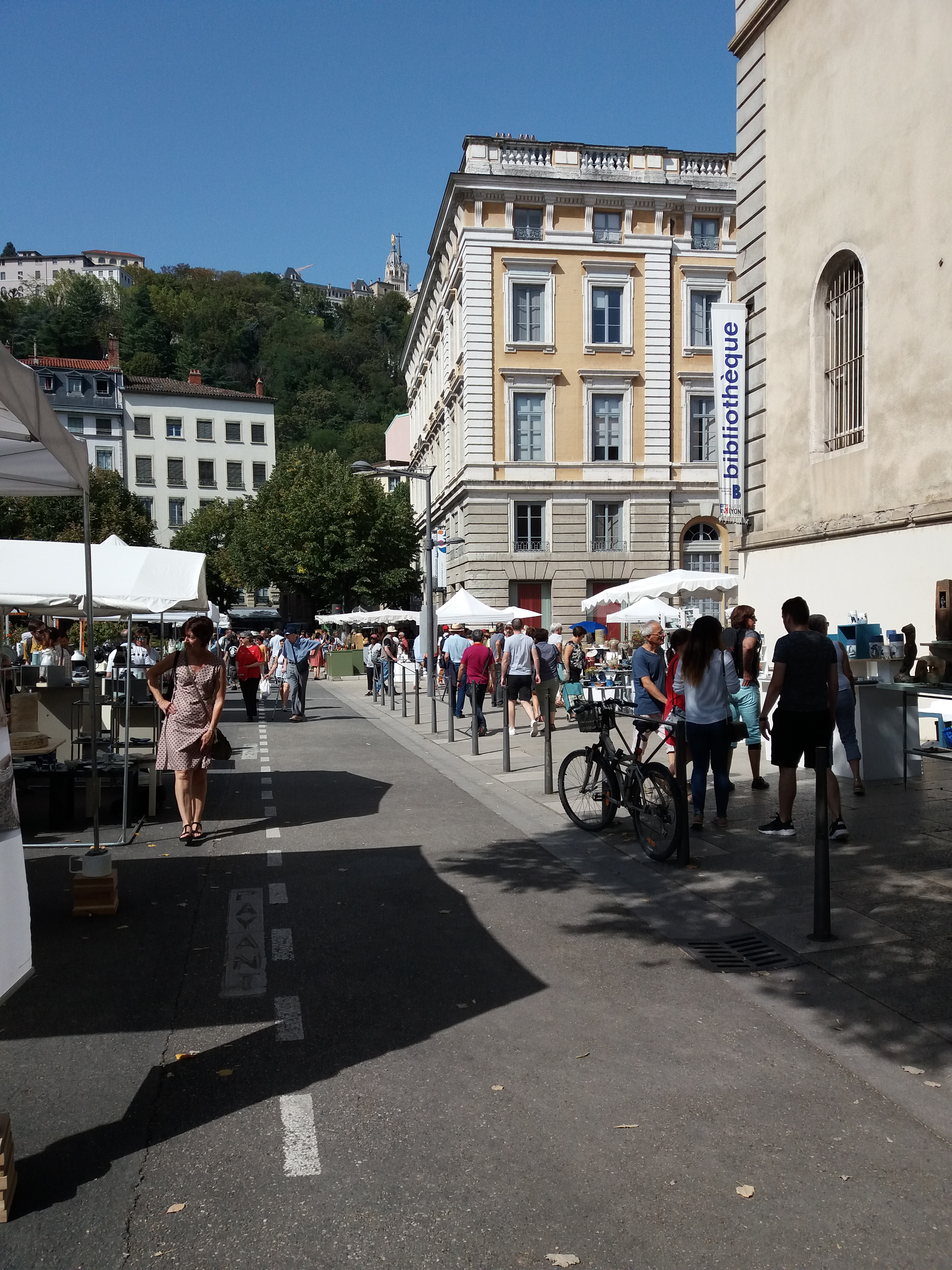 Les Tupiniers du Vieux Lyon 2019.